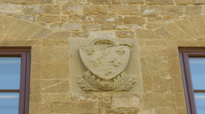 Palazzo peruzzi, stemma peruzzi